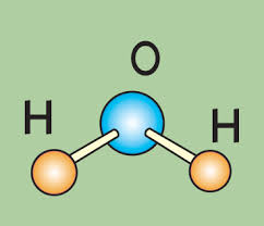 Molekul